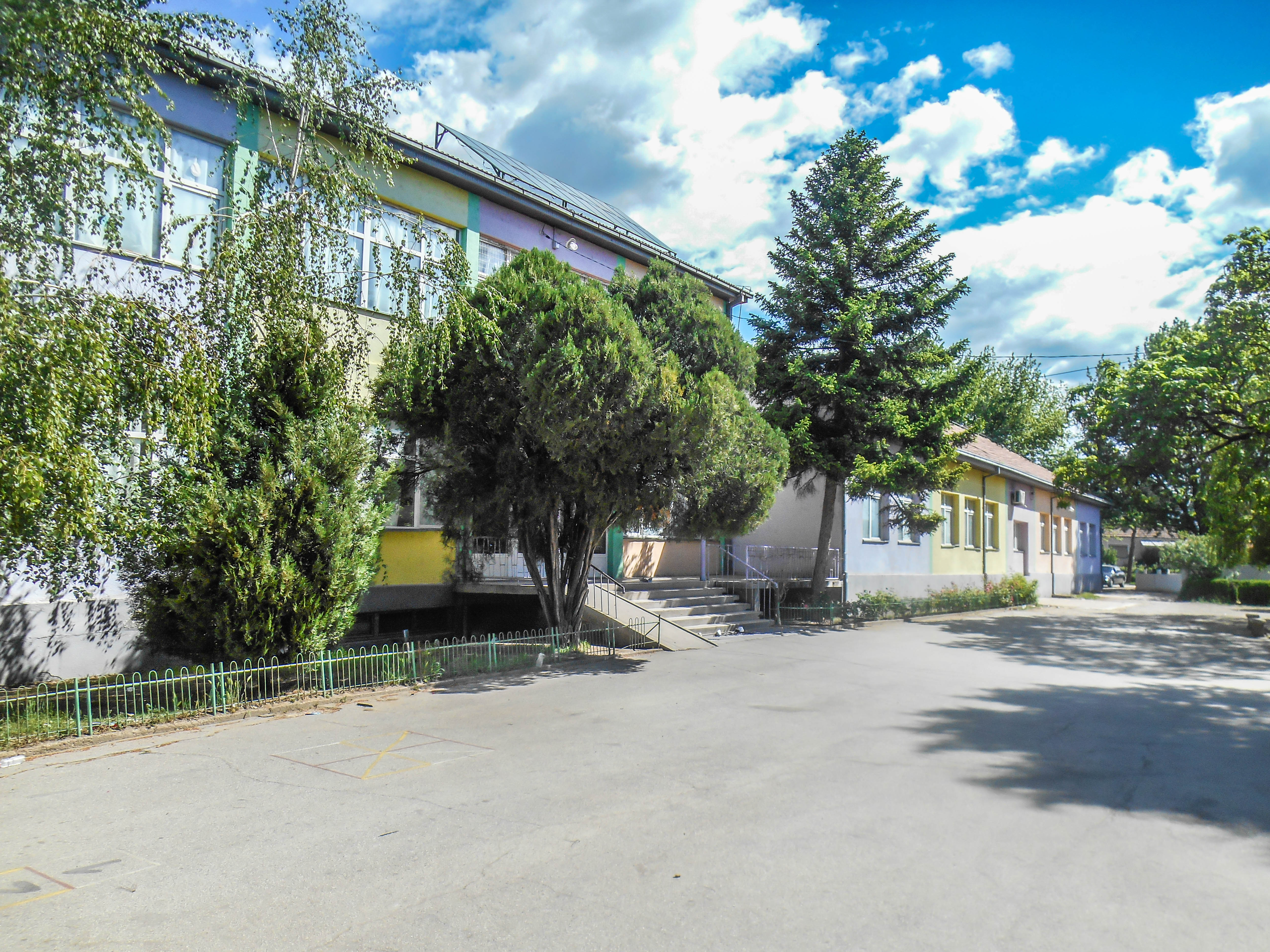 Основно училиште „Гоце Делчев“ - Василево